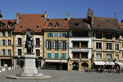 Yverdon: Place Pestalozzi